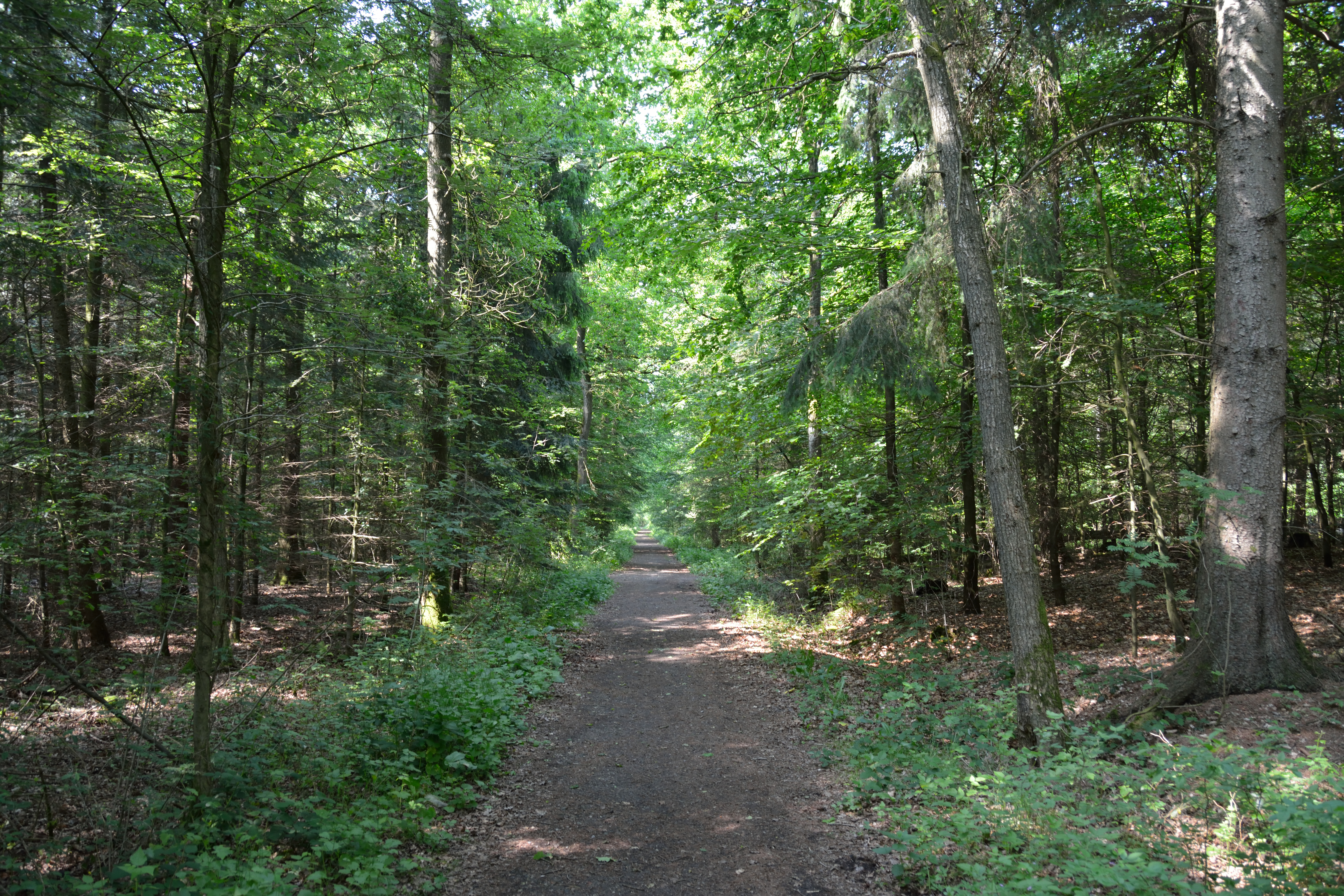 Der Kreis Steinburg hat mehrere Flächen unter dem gemeinsamen Namen "Landschaftsbestandteile und Landschaftsteile im Bereich mehrerer Gemeinden" zusammengefasst. Dieses Foto wurde in der „Waldfläche bei Kellinghusen“ aufgenommen, es ist das Teilstück Nr. 17.